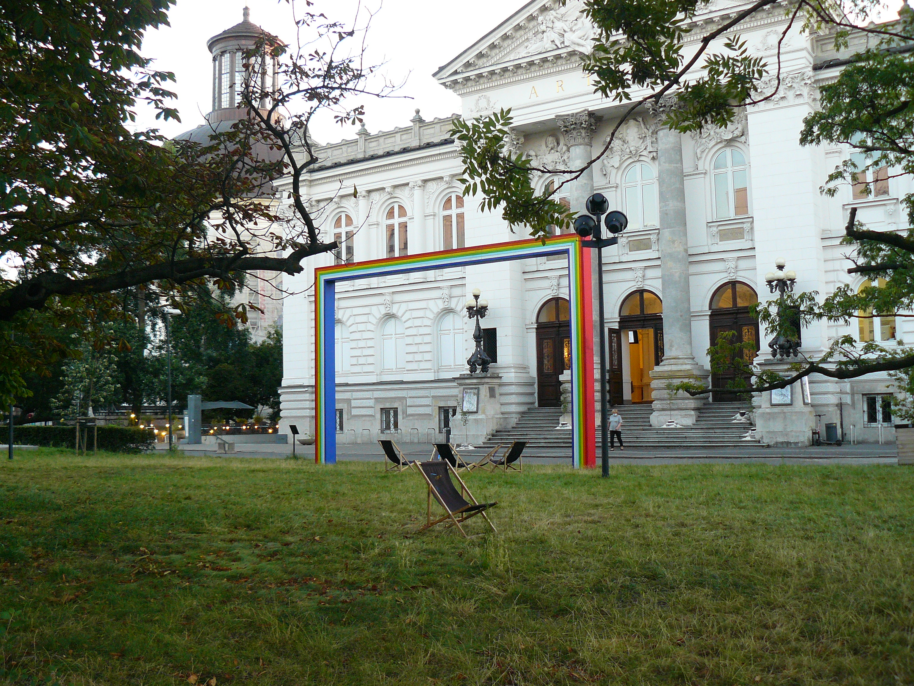 Zachęta w czasie protestów sierpień 2020.